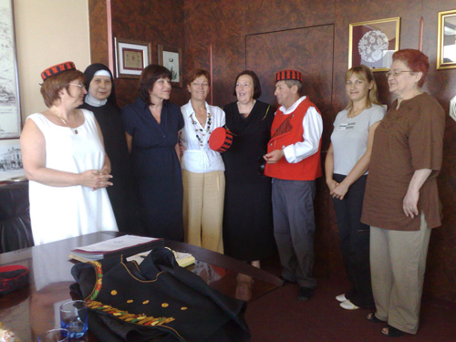 Kaparice na svečanom prijamu kod šibenske gradonačelnice Nediljke Klarić (s kapom u ruci) 30. srpnja 2008. Slijeva nadesno: Nelica Knežević iz obrta "VeNel", č. s. Fortunata iz samostana benediktinki sv. Luce, Liposava Kuštović iz obrta "Lipa", Milena Perčin iz drniške udruge "Žena", Vedran Knežević iz obrta "VeNel", Inga Marin iz udruge "Žena" i Marija Cipitelo Stojić.